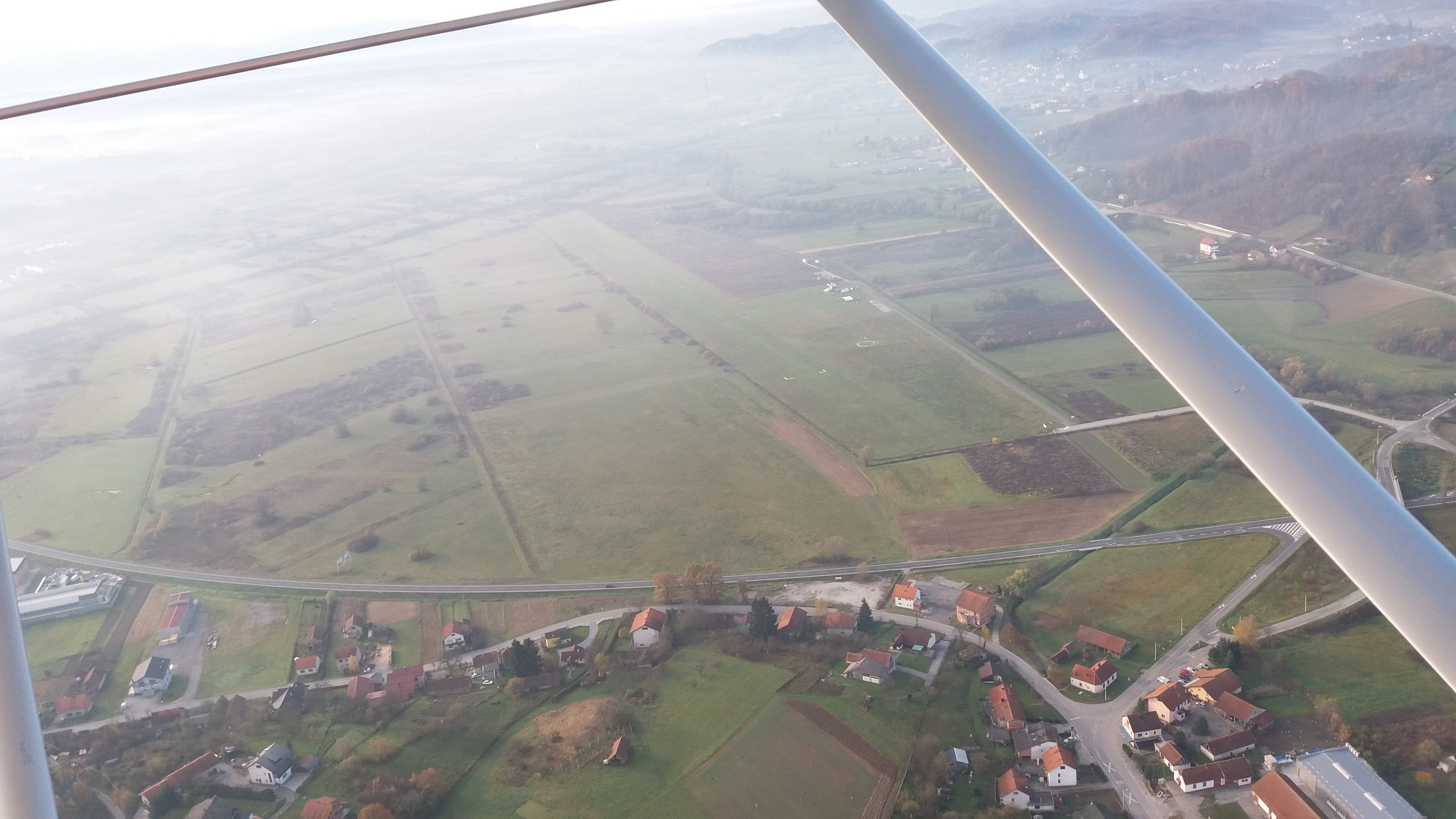 Zabok Airfield in november 2017.